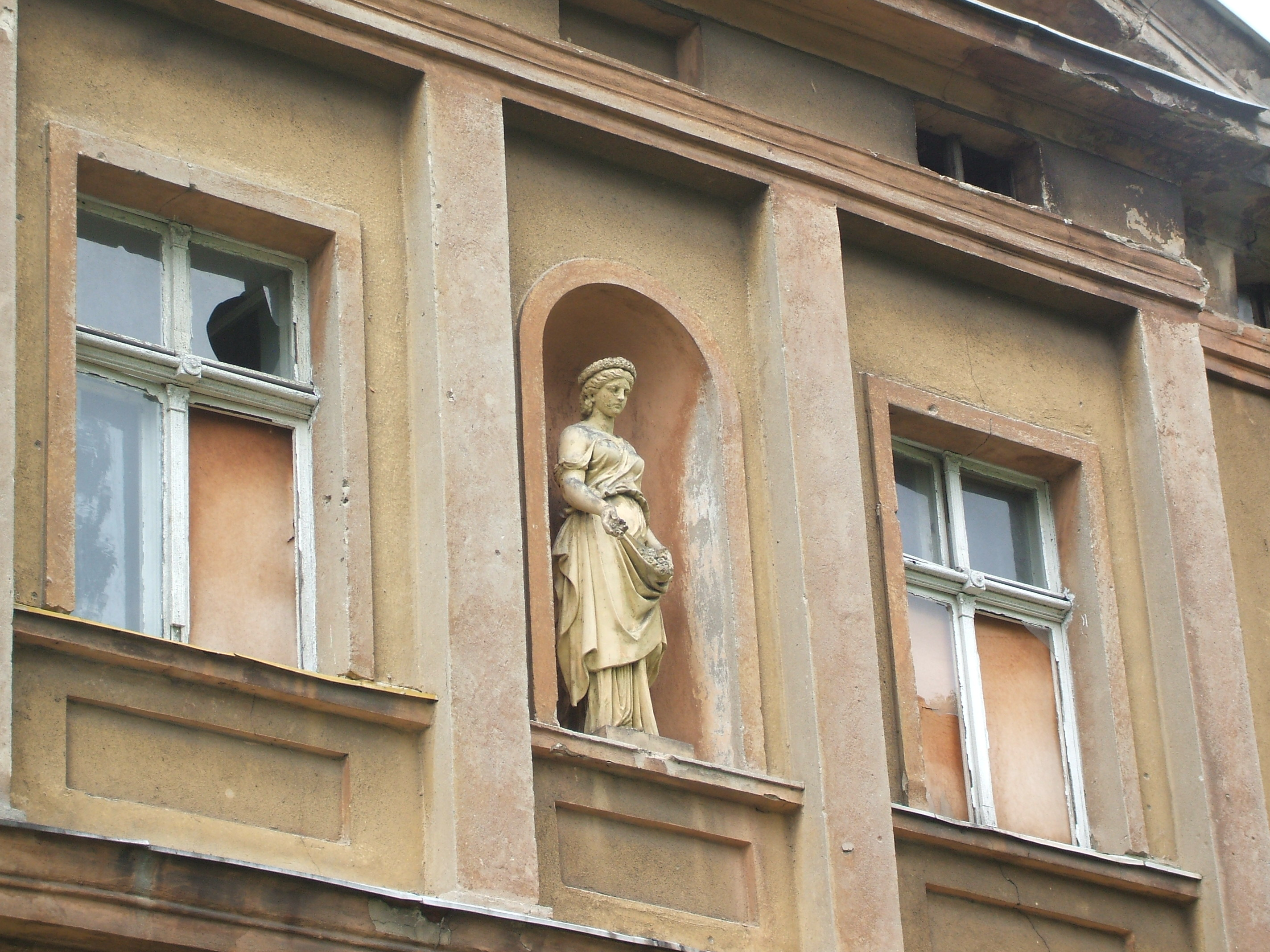 Rzeźba przedstawiająca siew lub wiosnę .